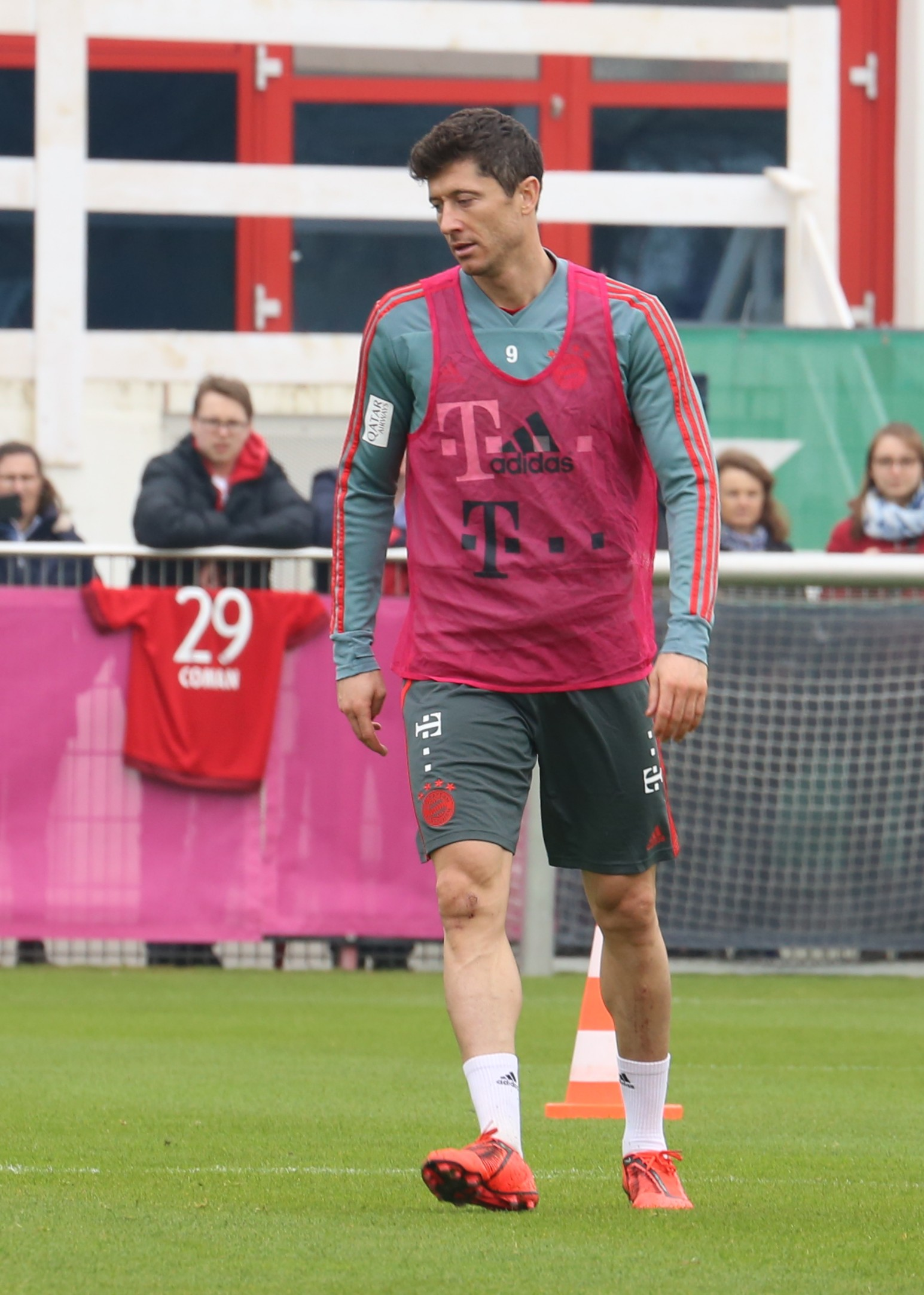 Robert Lewandowski, am 10. April 2019 beim Training auf dem Gelände des FC Bayern München